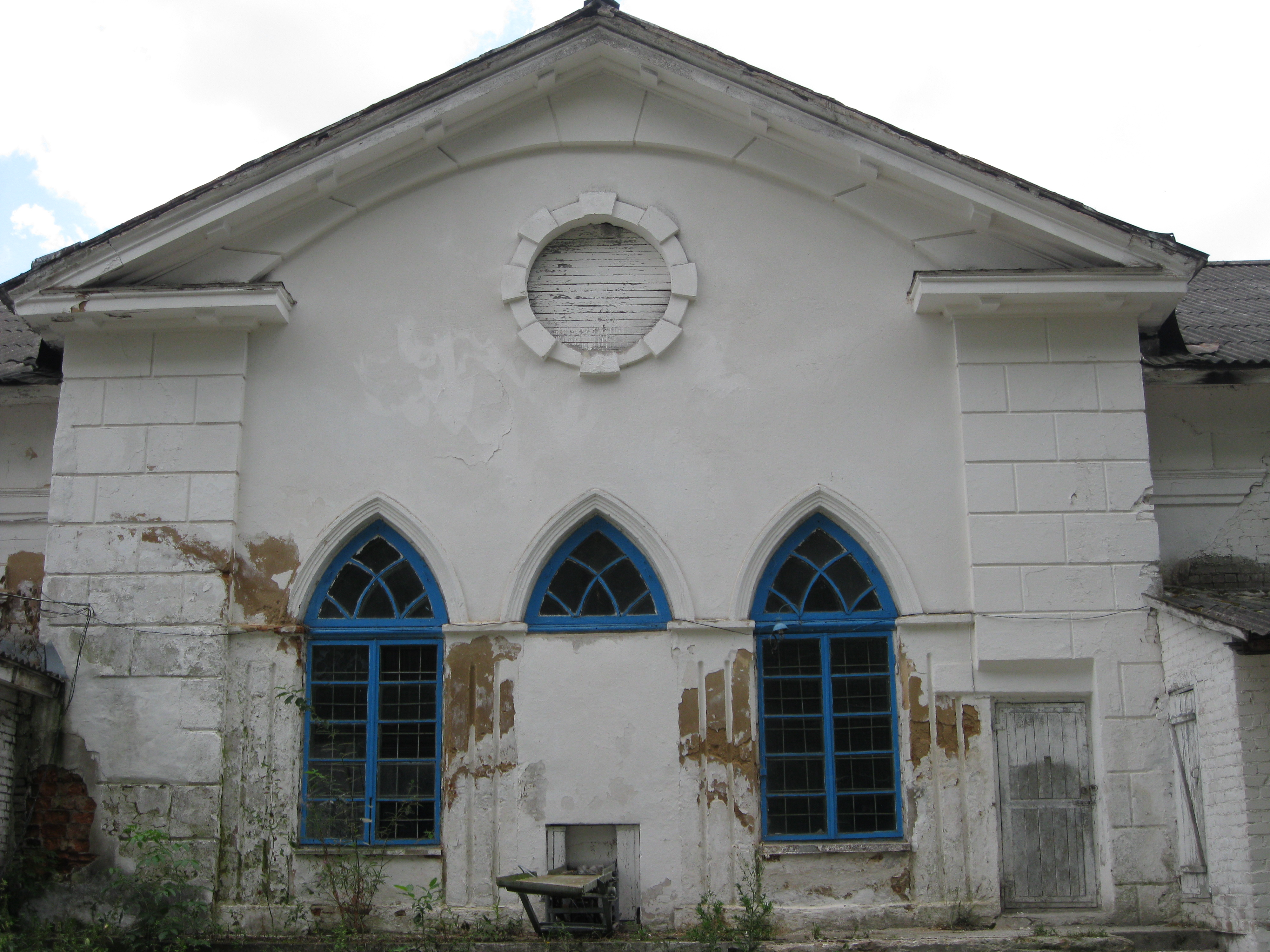 Палац у Начы (выгляд ззаду).